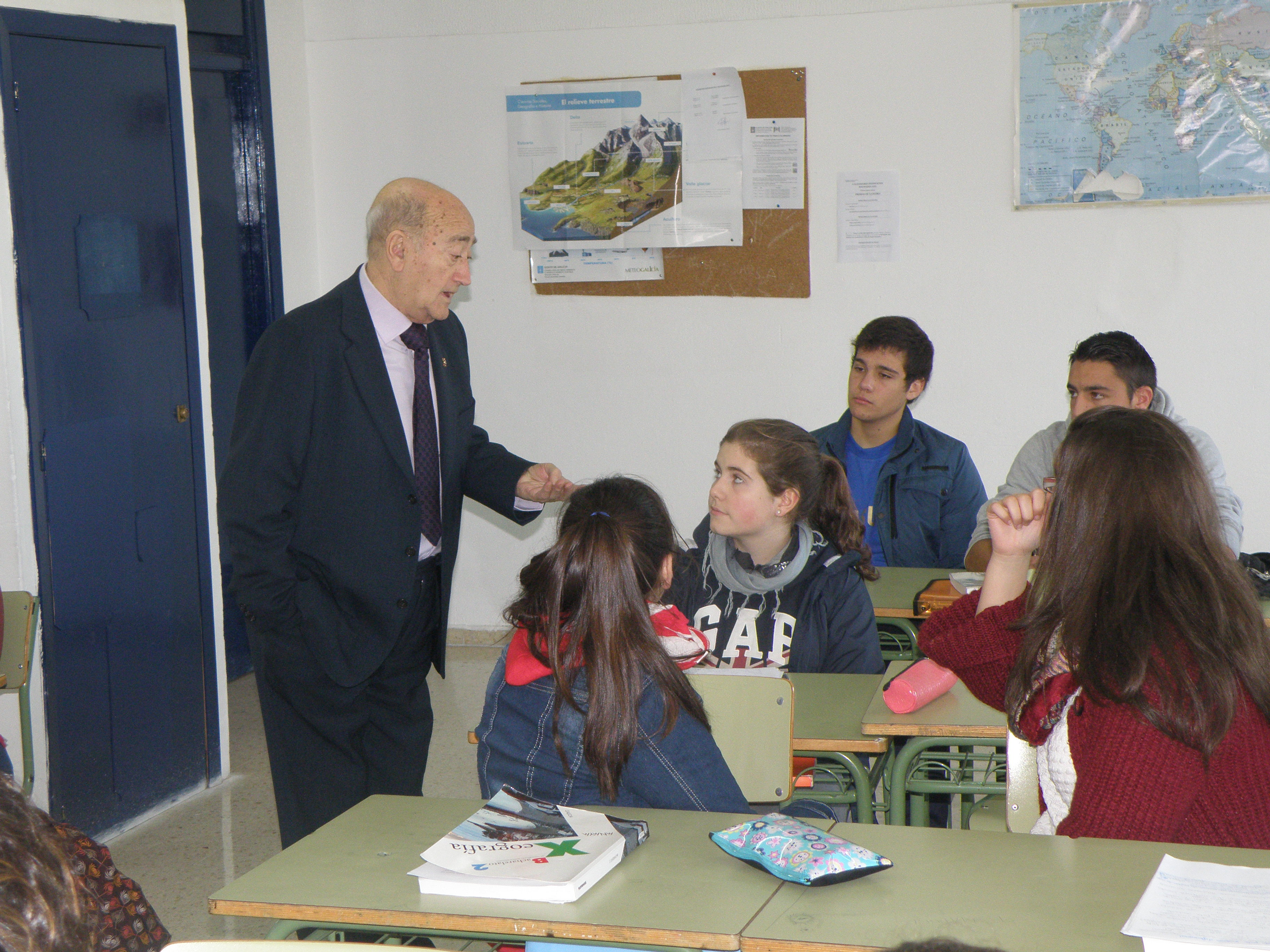 Olimpio Arca no IES Manuel García Barros da Estrada